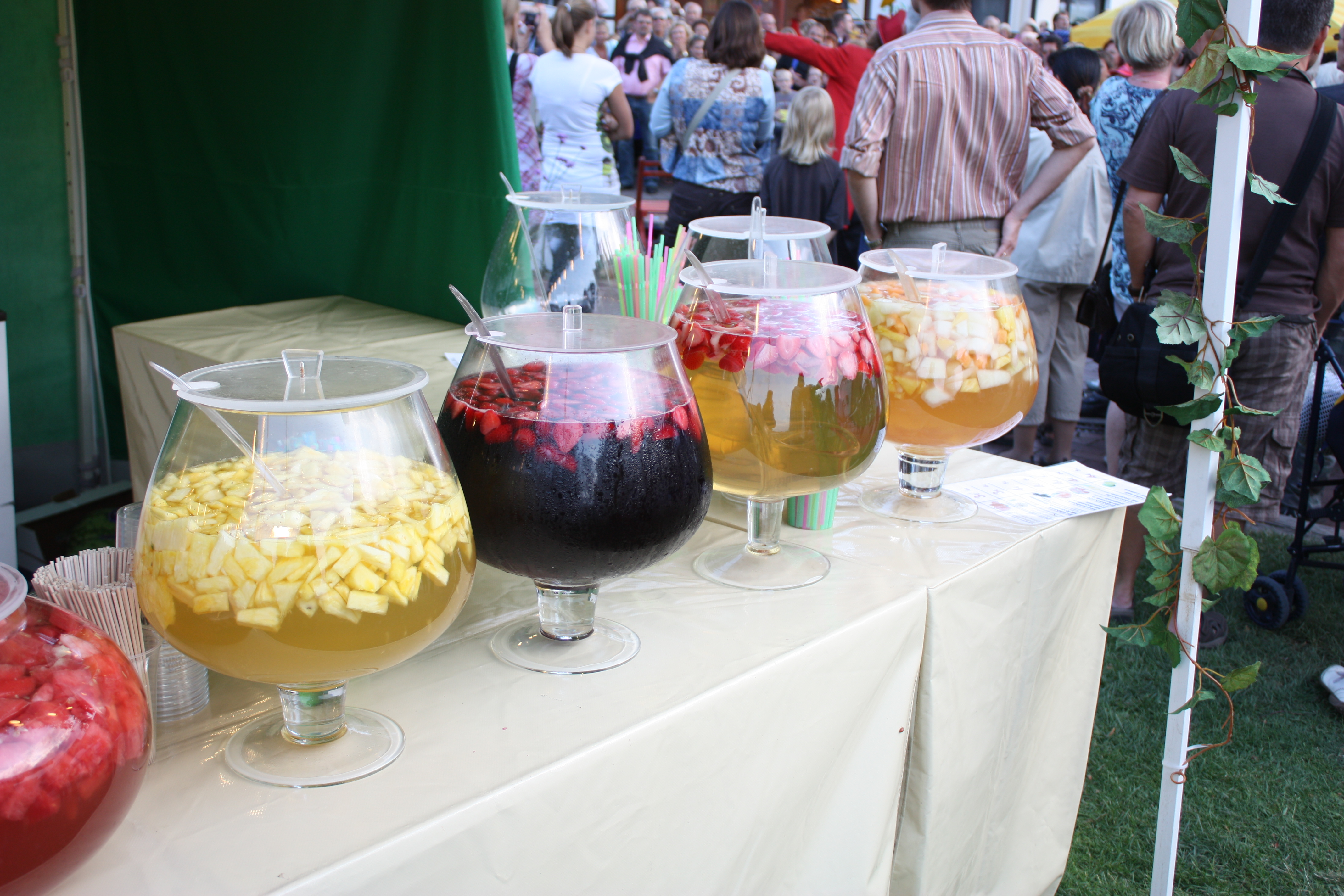 Früchtebowle, Steinhude